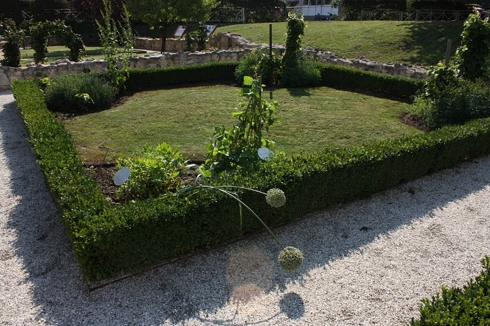 Živý plot buxus